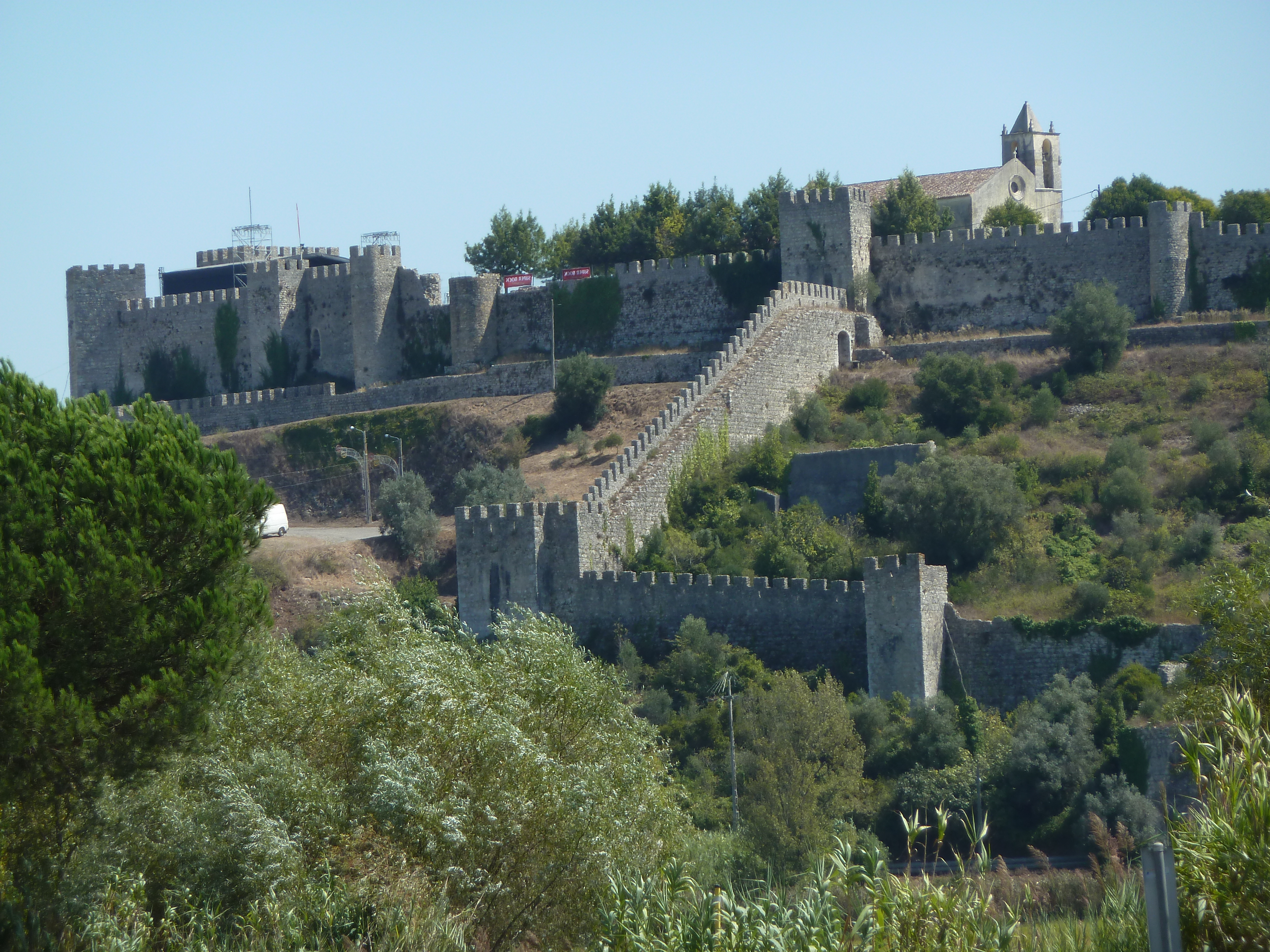 Castelo de Montemor-o-Velho. This file was uploaded for Wiki Loves Monuments in Portugal with the unique identifier 70442.